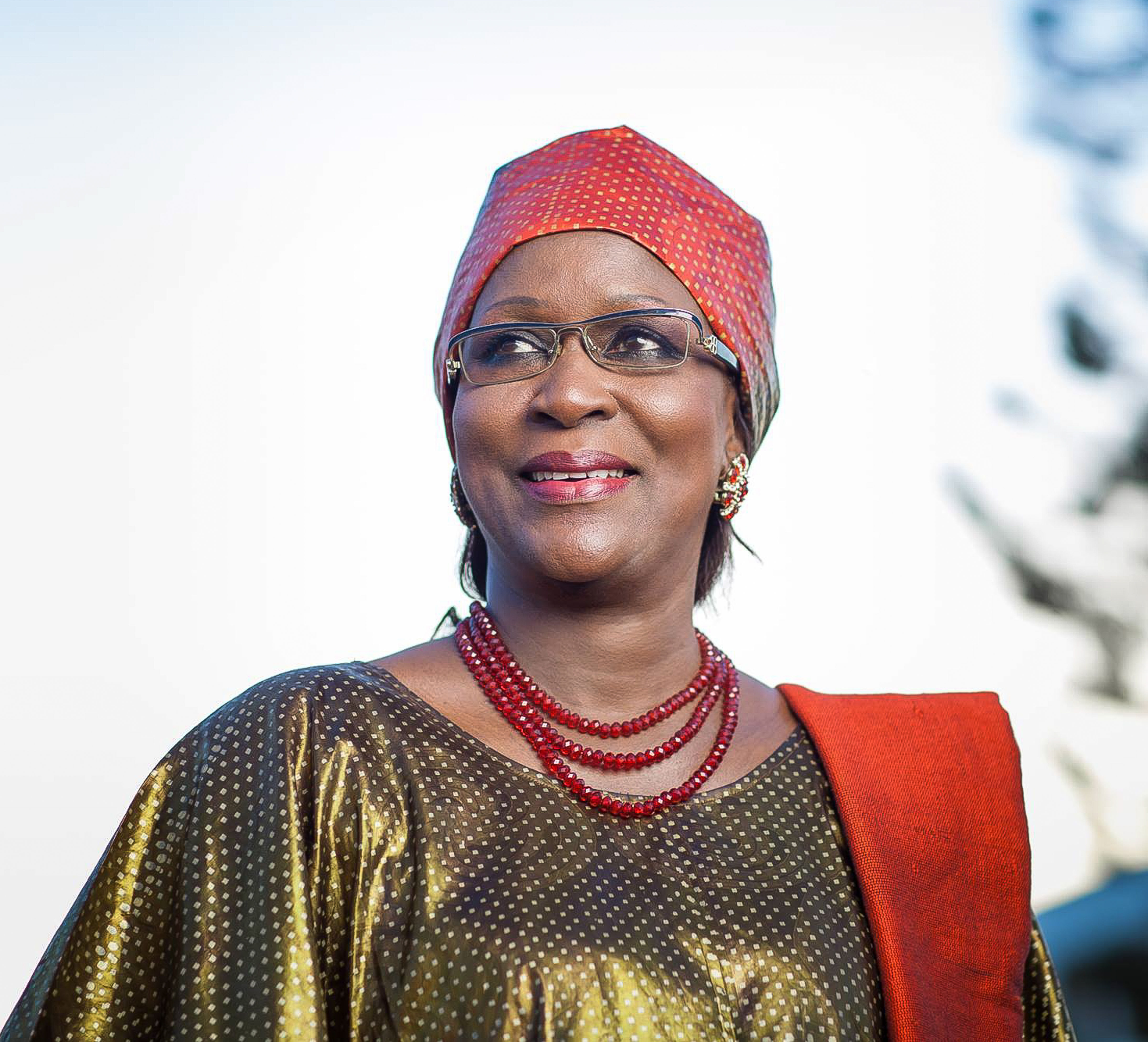 Photo du Pr Amsatou Sow Sidibé en janvier 2016